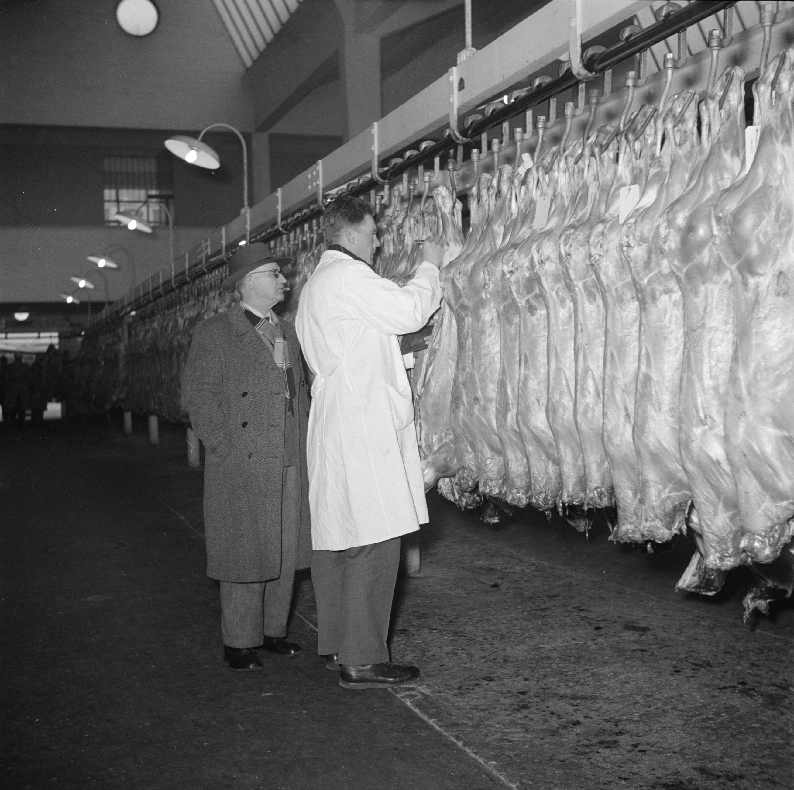 Collectie / Archief : Fotocollectie Van de Poll Reportage / Serie : Flæskehallen, de vleeshallen van Kopenhagen Beschrijving : Keuring van het vlees aan de slachtlijn van de vleeshallen in het deel waar varkens geslacht en verwerkt worden Datum : maart 1954 Locatie : Denemarken, Kopenhagen, Kødbyen Trefwoorden : keuringen, slachten, slachterijen, slagers, varkens, vlees, vleesindustrie Fotograaf : Poll, Willem van de, [onbekend] Auteursrechthebbende : Nationaal Archief Materiaalsoort : Negatief (zwart/wit) Nummer archiefinventaris : bekijk toegang 2.24.14.02 Bestanddeelnummer : 252-9058